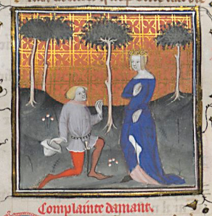 Iluminura Complainte d'amant em manuscrito de obras de Guillaume de Machaut